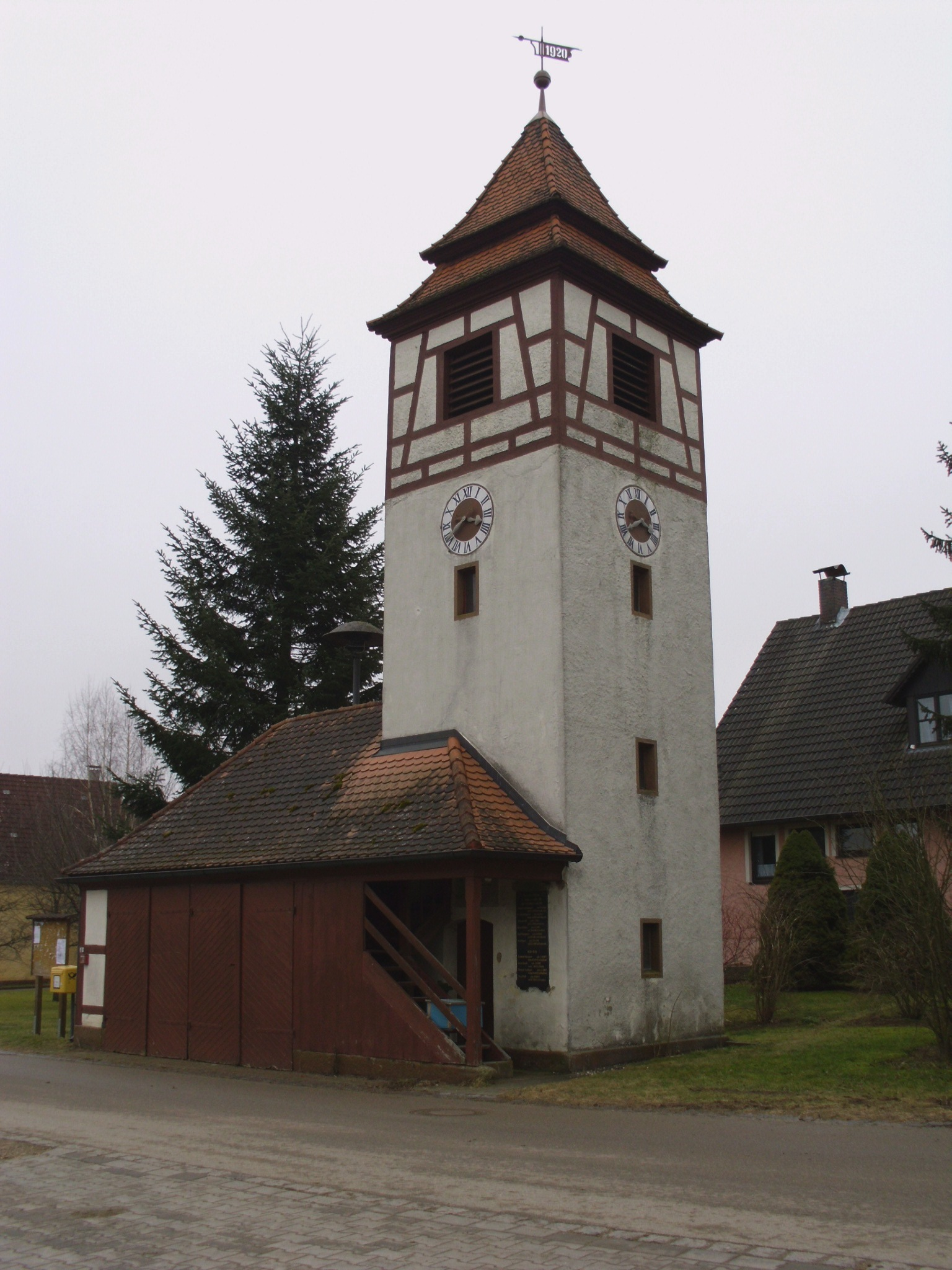 Der Glockenturm von Unterhambach, Ortsteil von Gunzenhausen im mittelfränkischen Landkreis Weißenburg-Gunzenhausen, Bayern.